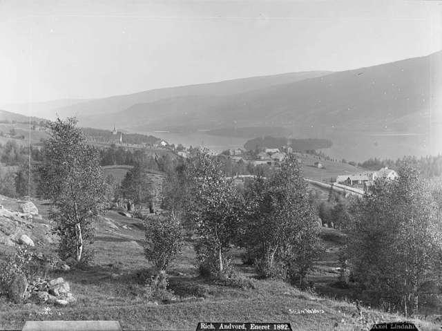 Frå Slidre med Slidredomen